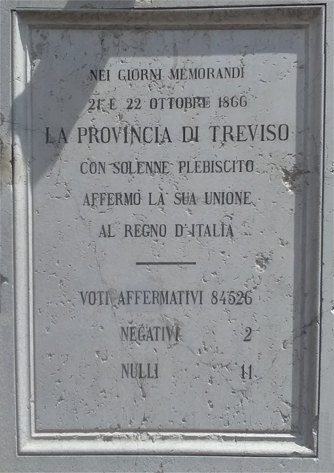 Lapide commemorativa dei risultati del Plebiscito del Veneto del 1866 posta sulla facciata sud del Palazzo dei Trecento in Piazza dei Signori a Treviso